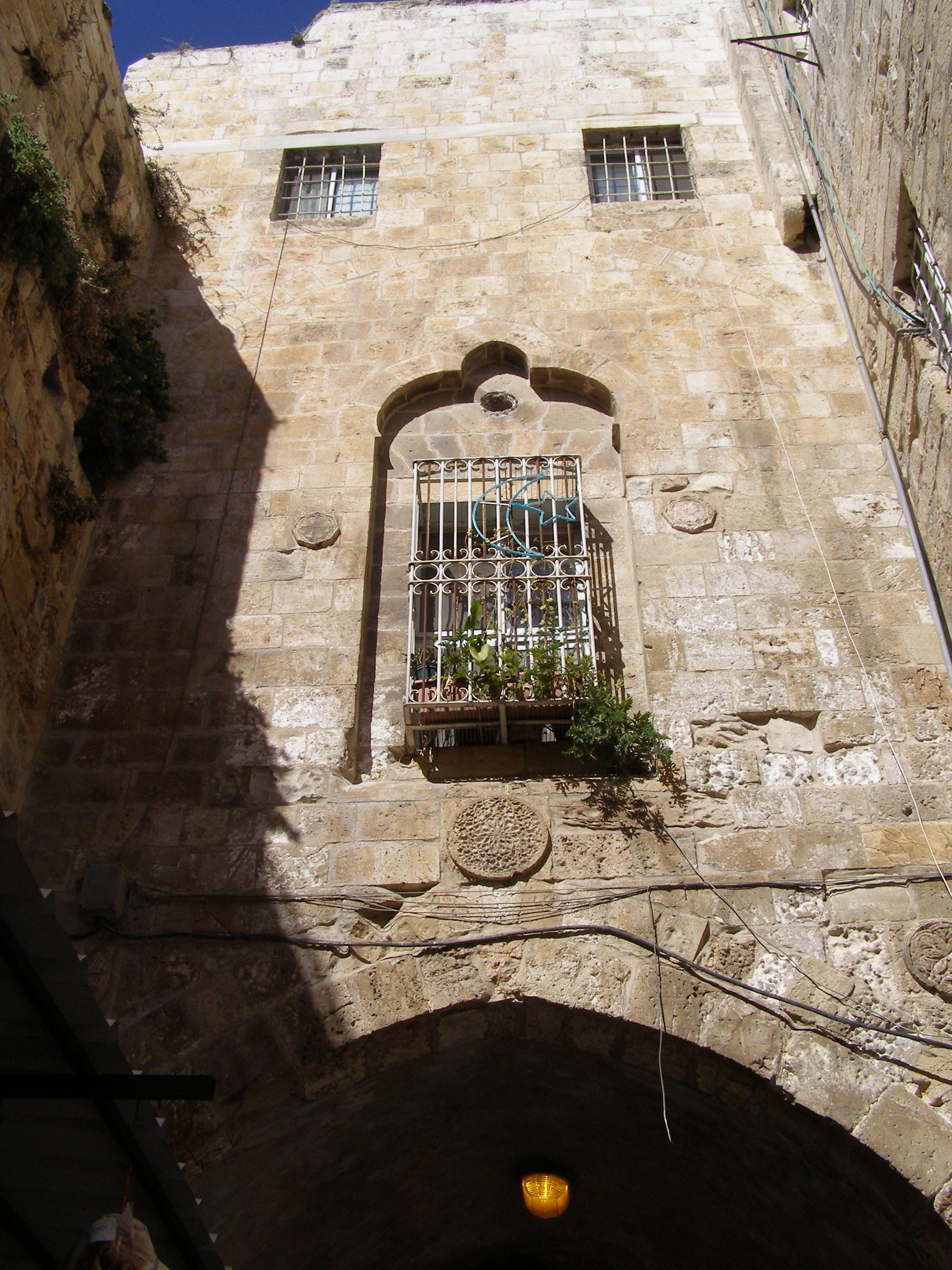 בית ברובע המוסלמי רישיון נוצר על ידי משתמש:Ranbar